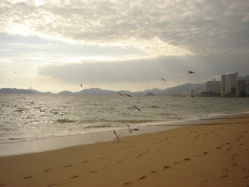 Playa Icacos en Acapulco, Guerrero, México.